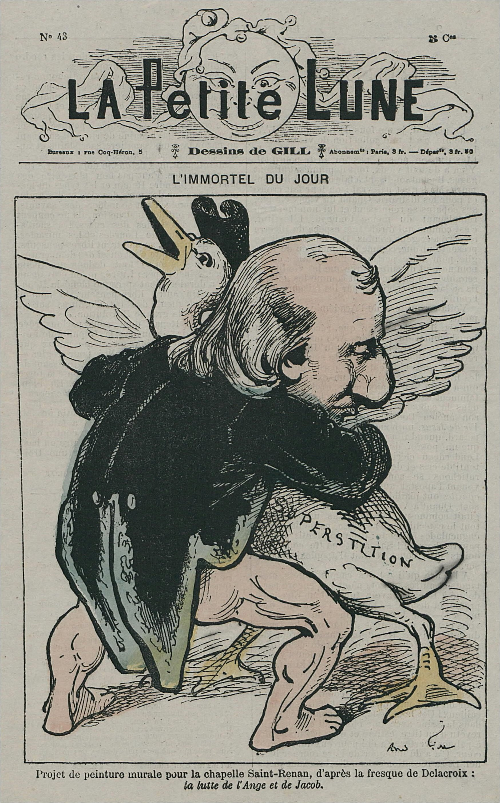 La Petite Lune n°43 : « L'immortel du jour. Projet de peinture murale pour la chapelle Saint-Renan, d'après la fresque de Delacroix : la Lutte de l'Ange et de Jacob ». Ernest Renan terrasse une oie religieuse nommée Superstition.